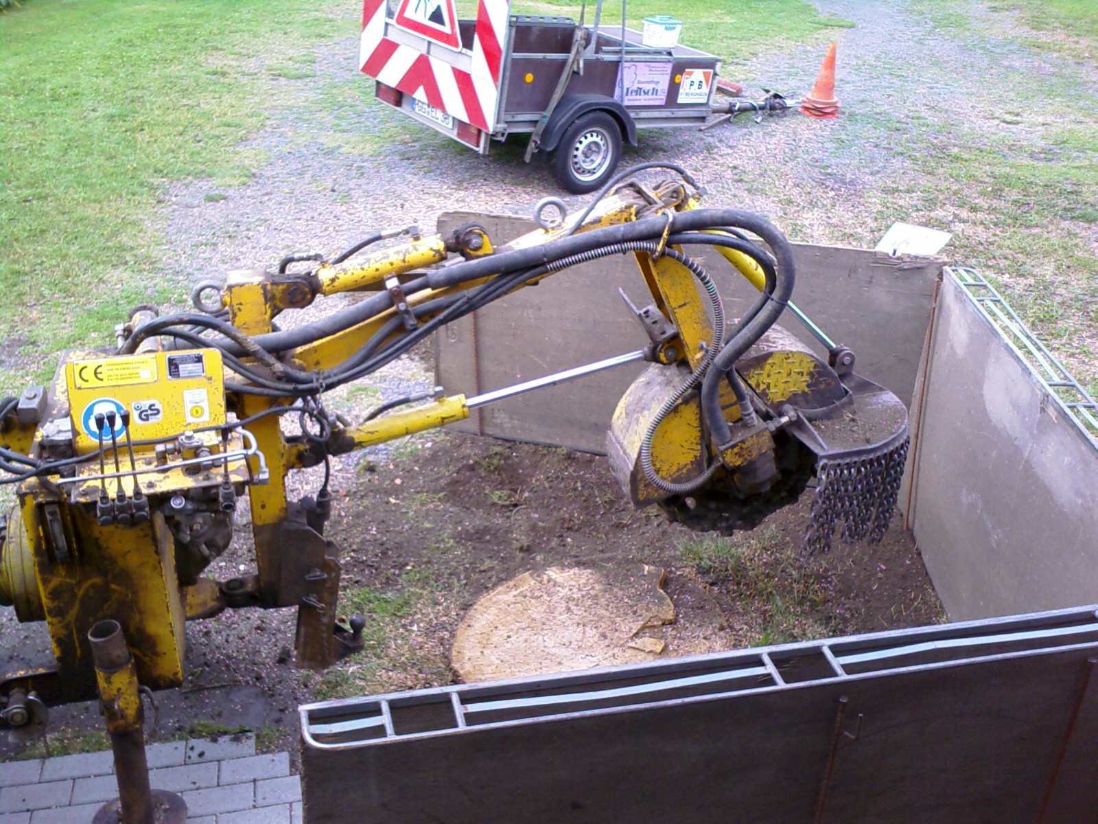 Stubbenfräse, Riedsee bei Leeheim, Kassenhaus; Riedstadt, Hessen, Deutschland